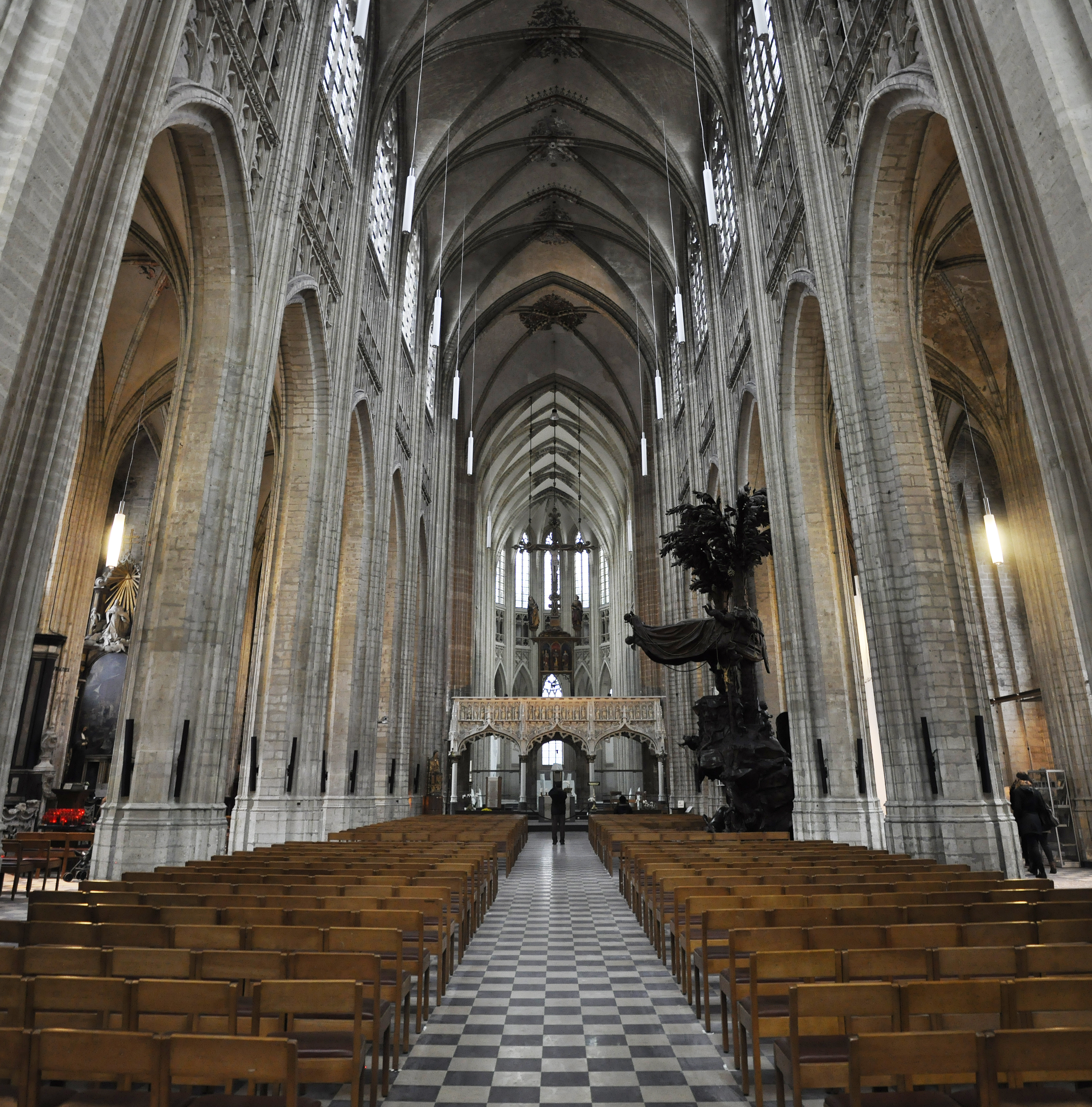 kerkschip Leuven Sint-Pieterskerk 23-11-2013 This photo of immovable heritage has been taken in the Flemish Region